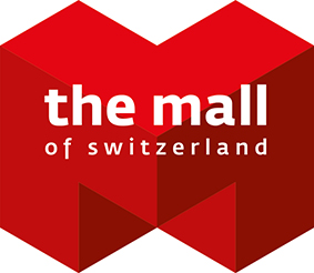 Logo von Mall Of Switzerland